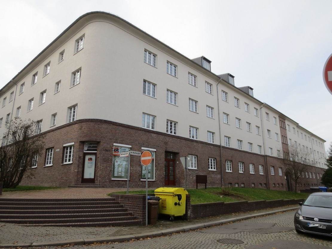 Am Wartburghof: Kulturdenkmal Chemnitz Bernsdorf.